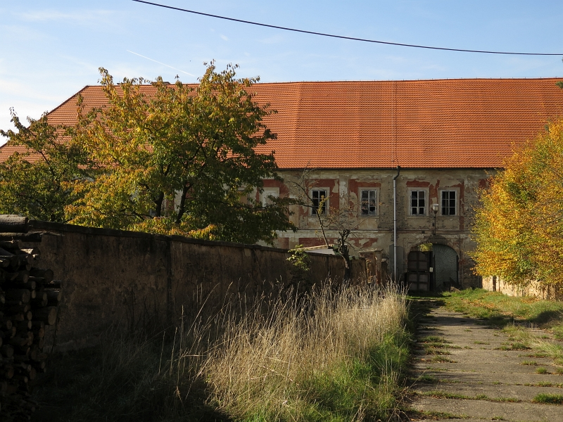 Zámeček Krukanice, Krukanice 1, Krukanice.